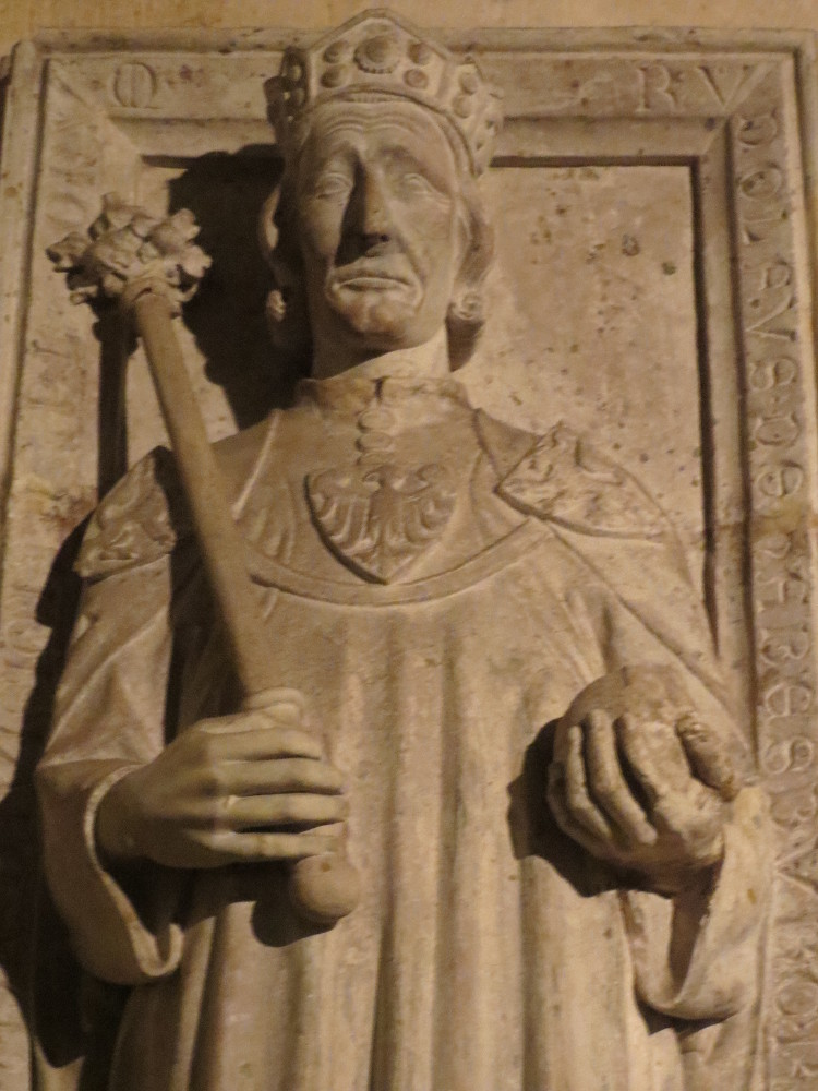 Epitaph Rudolf von Habsburg in der Kaisergruft des Speyerer Domes